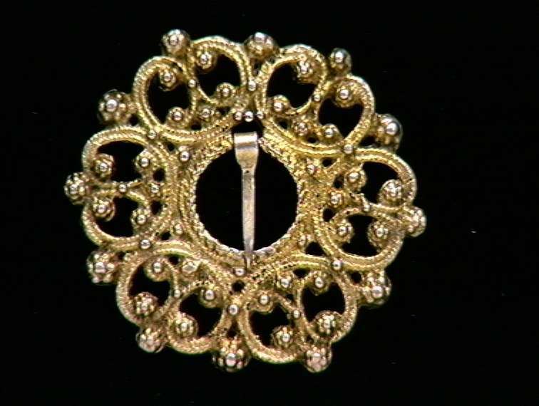 Støpt rosesølje i forgylt sølv fra Valle i Aust-Agder. Foto Anne-Lise Reinsfelt / Norsk Folkemuseum, NF.1911-0684.